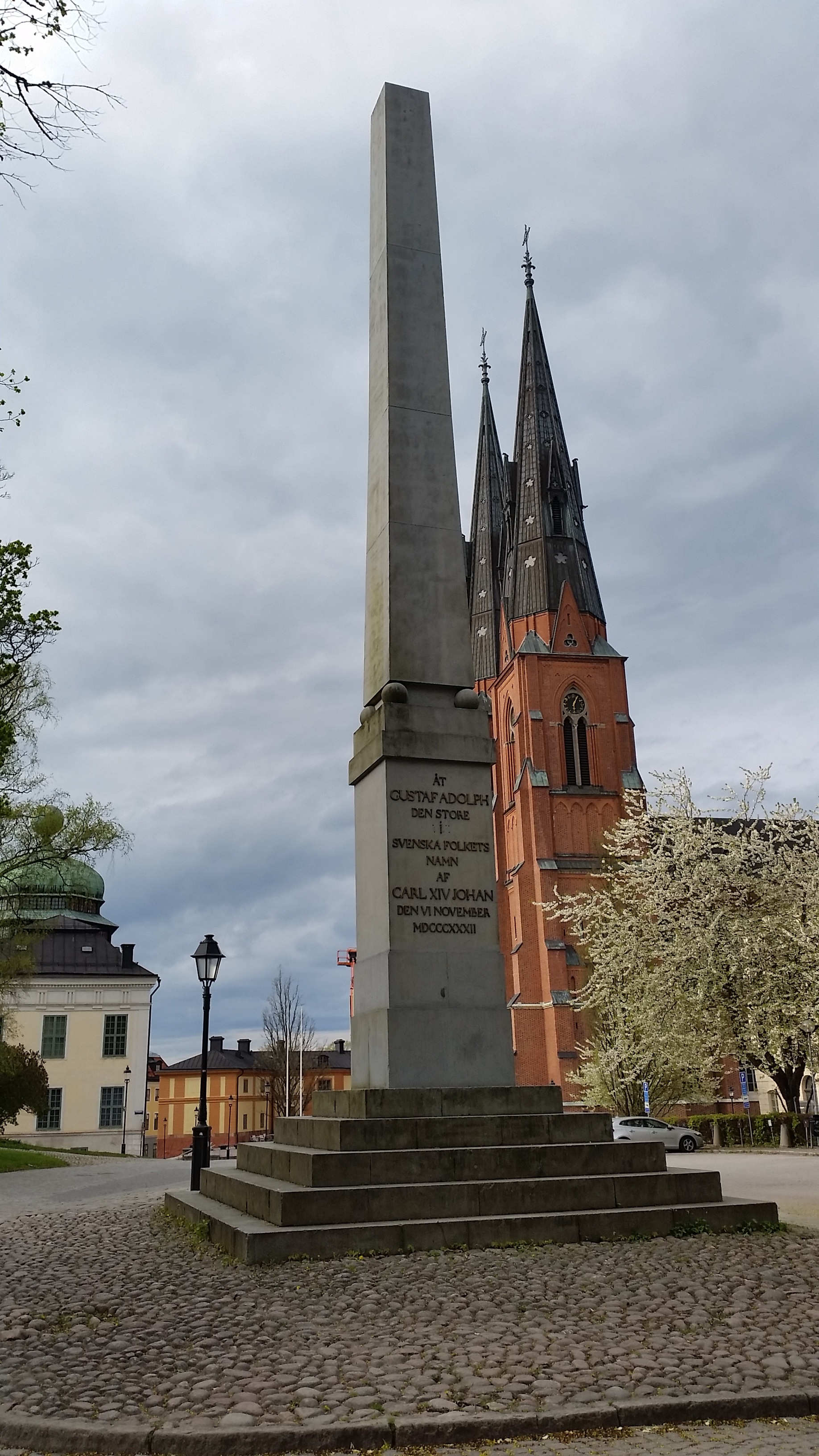 obelisk till minne av Gustav II Adolf (1833) - Louis Jean Desprez. Uppsala